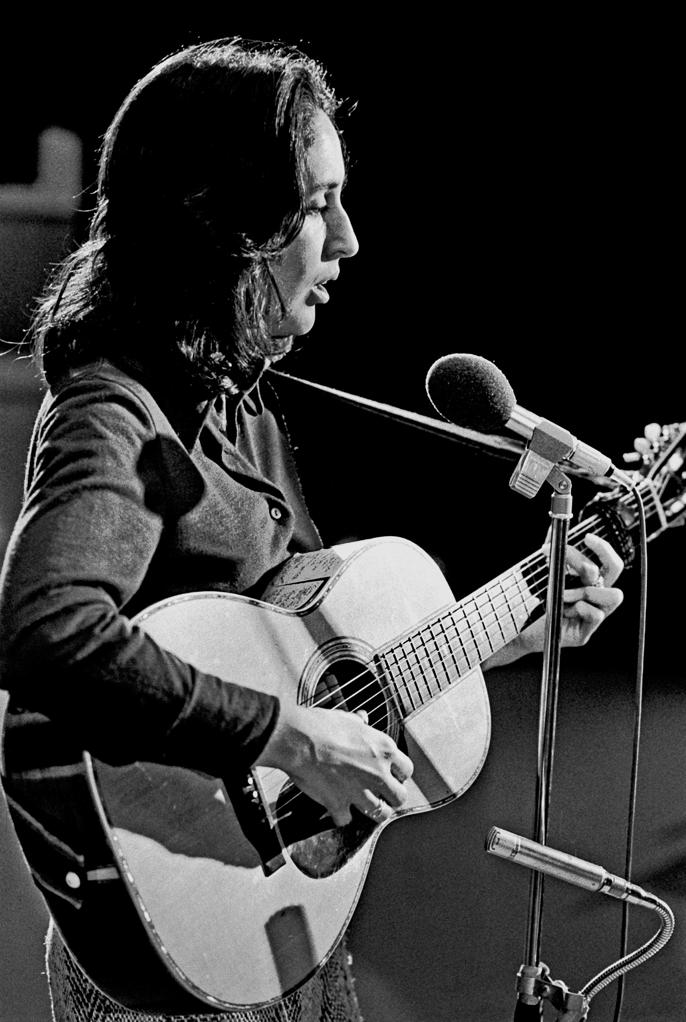 Die Protestwelle ebbte 1973 schon ab, aber Joan Baez hatte nicht nur Protest zu bieten: Hier ein Auftritt im Fernsehstudio in Hamburg.